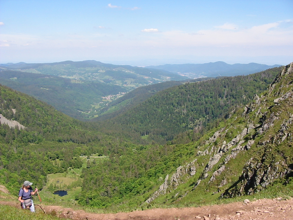 Massif des Vosges La vallée de la Petite Fecht - commune de Stosswihr - vue du col de Falimont près du Hohneck. Photo personnelle, prise le 8 juin 2006 Auteur : Christian Amet